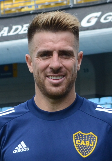 Julio Buffarini en la Bombonera